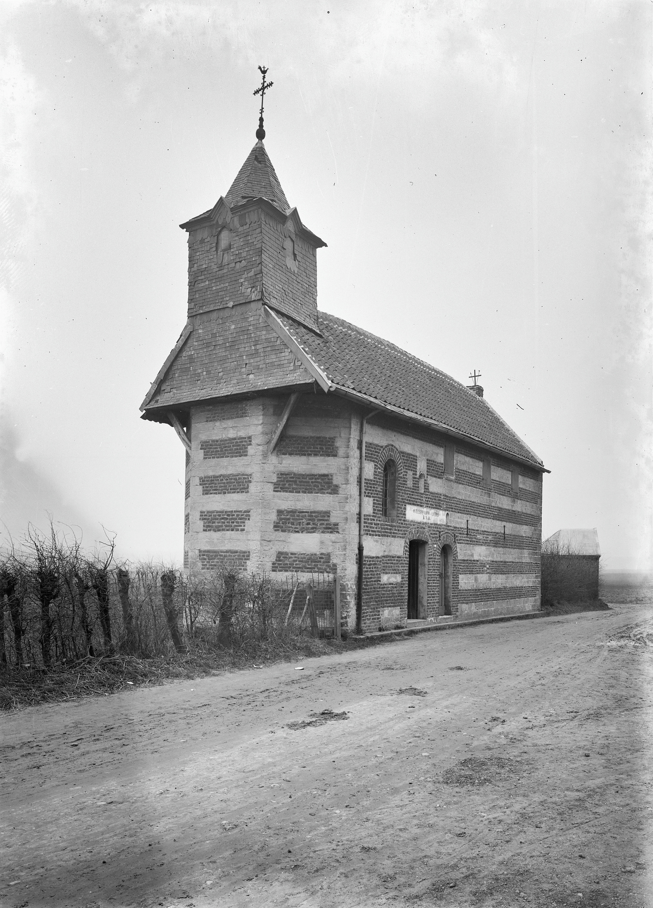 Hermitage: exterieur naar het zuiden (opmerking: Fotonummer 9144)